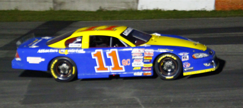 Claude Leclerc - Circuit Riverside Speedway Ste-Croix - 24 août 2013 - photo Botakap